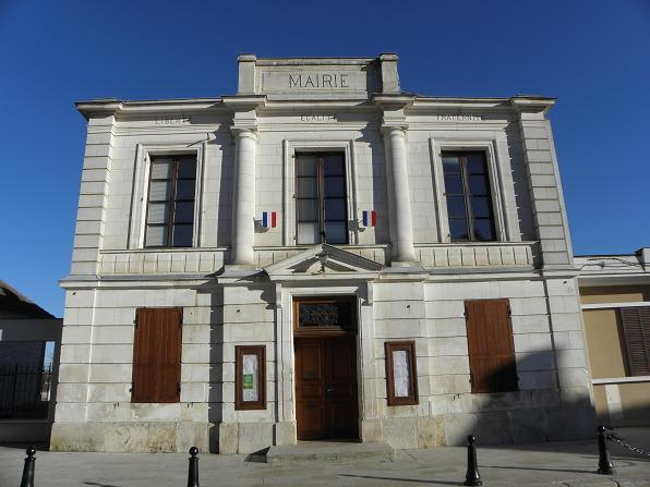 Mairie d'Appoigny (89).